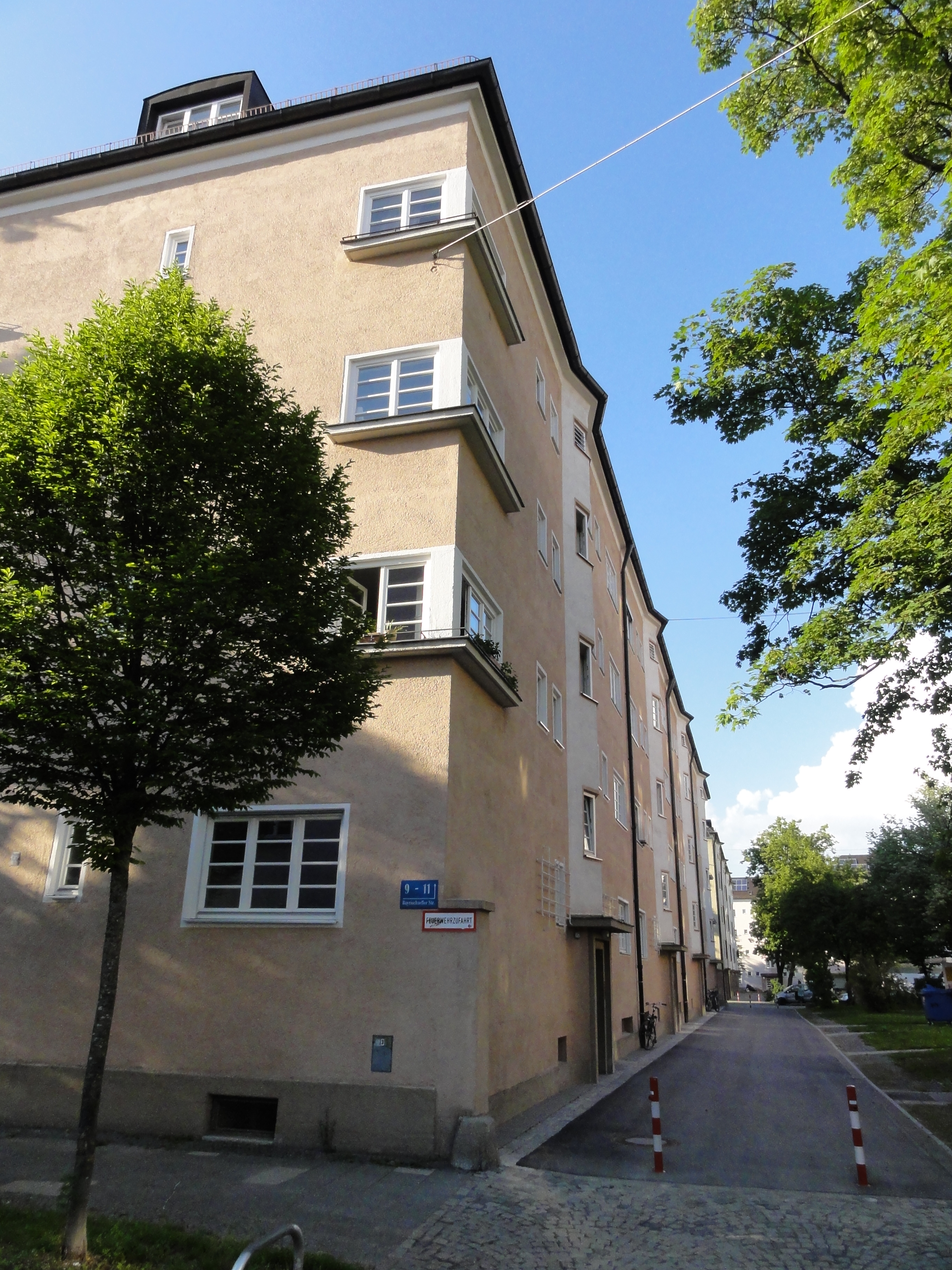 München-Giesing (Stockwerksiedlung Walchenseeplatz) — Bayerischzellerstrasse 9 - 11 (Wohngebäude).